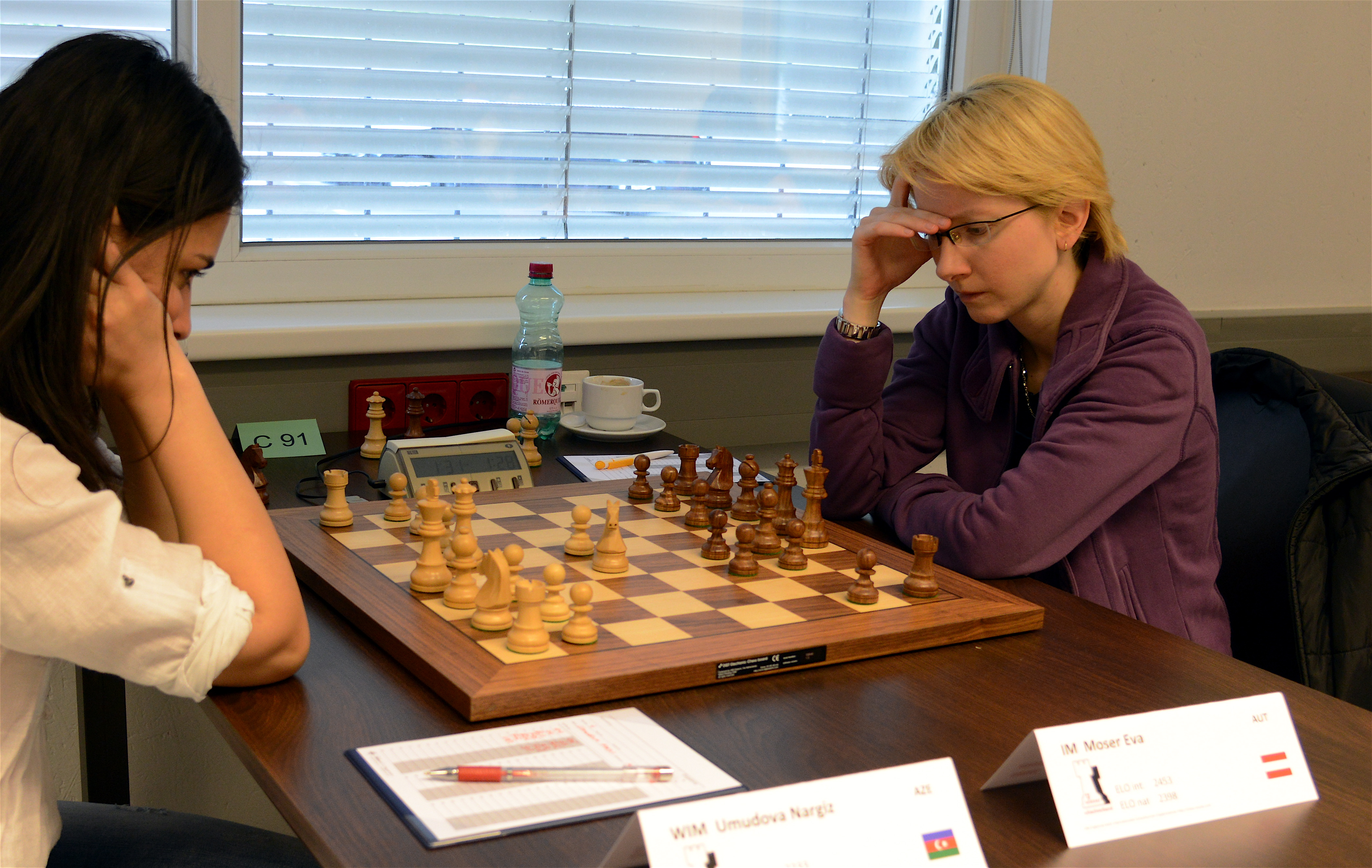 Eva Moser beim Internationalen Damenschachturnier in Wien, Mai 2013